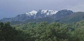 Vertiente sur del Pico Almanzor (Sistema Central, España).